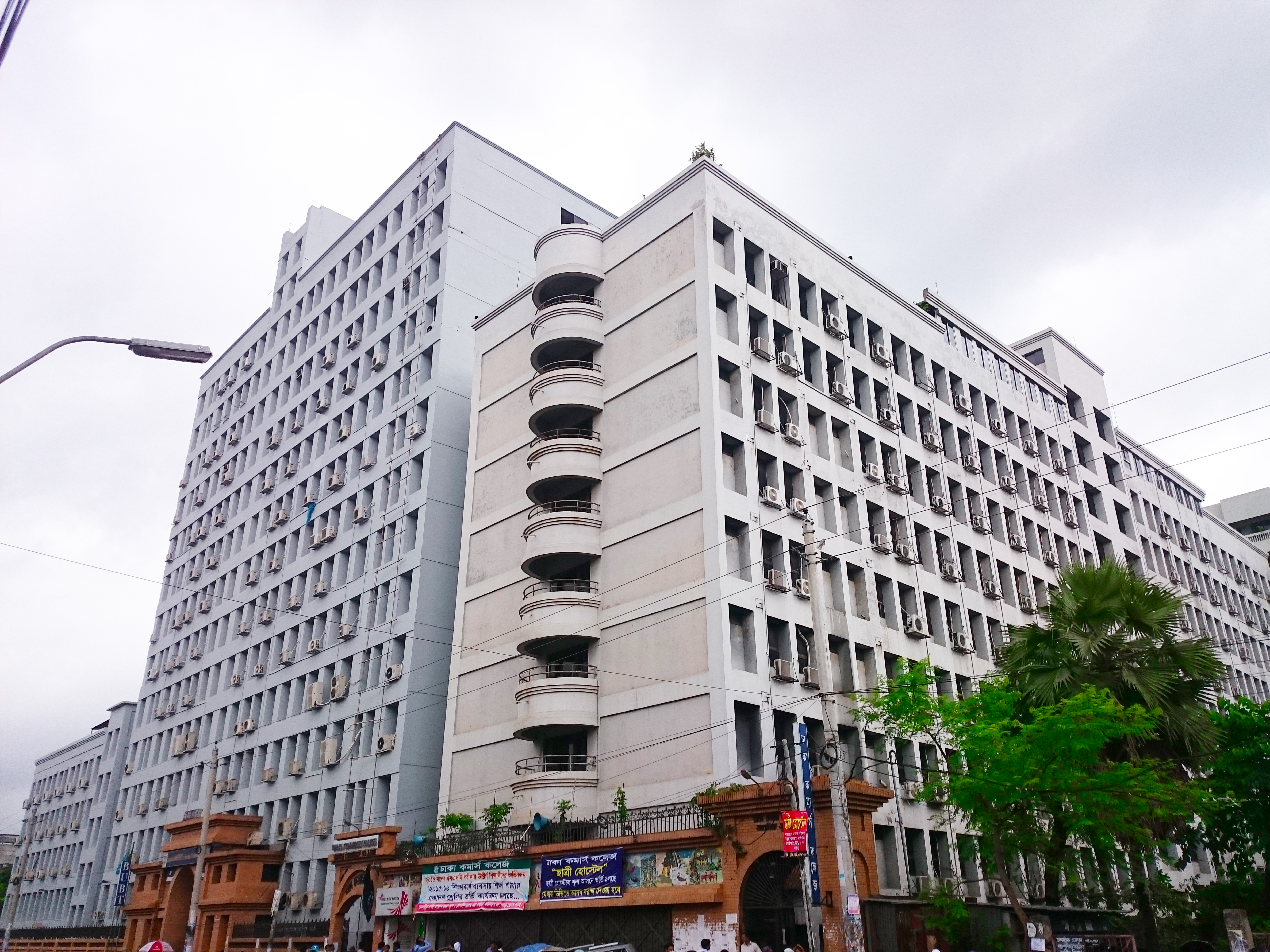 এটি ঢাকা কমার্স কলেজ এর ছবি.